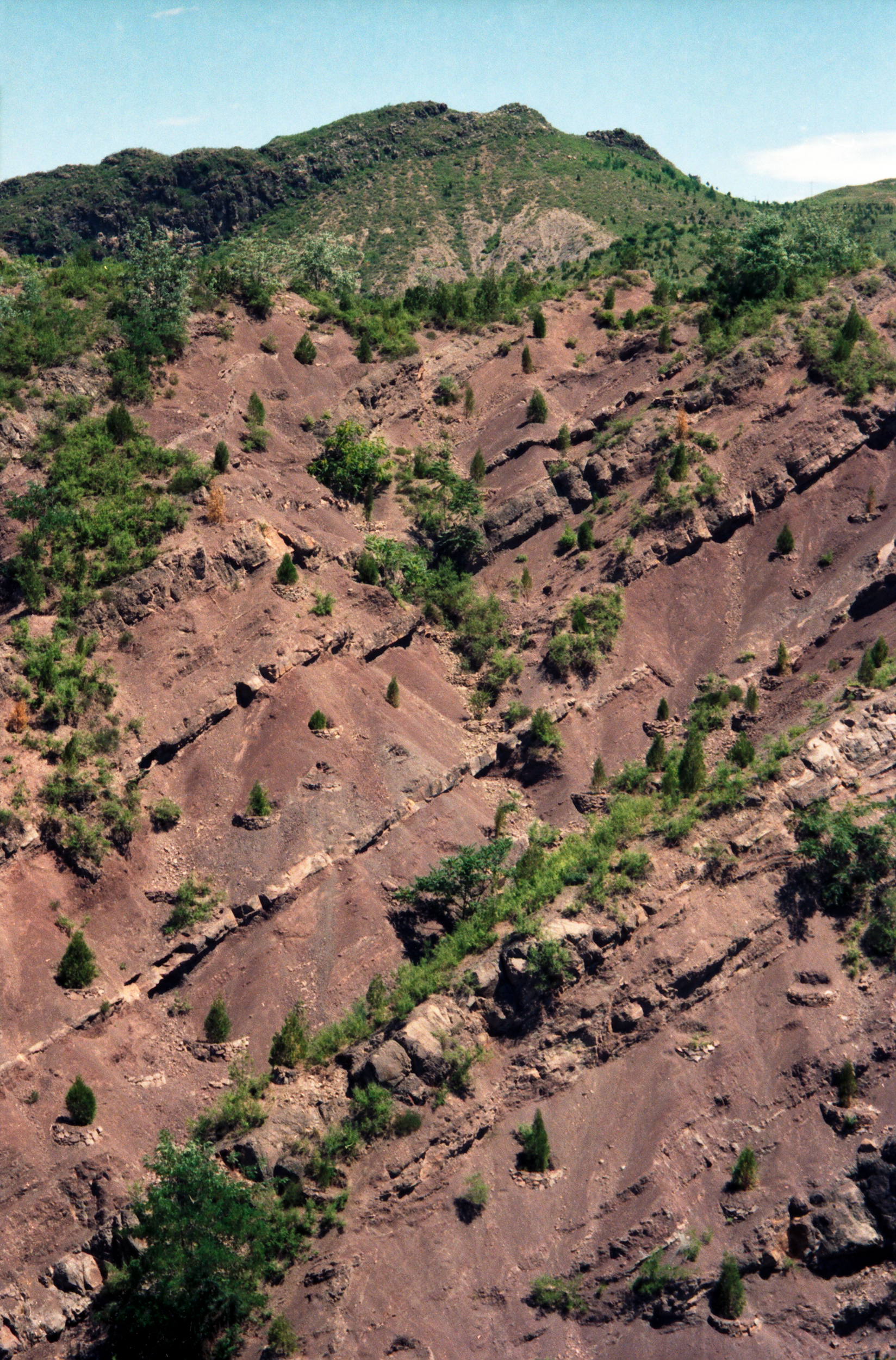 VR China, östliches Simatai, Aufforstung